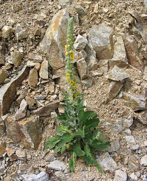 Molène de mai Photo Jean Tosti (Bélesta-de-la-Frontière, 27/04/04) Licence GFDL Jean Tosti 04/2004